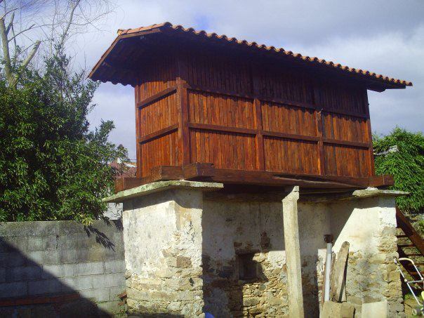 Cabazo